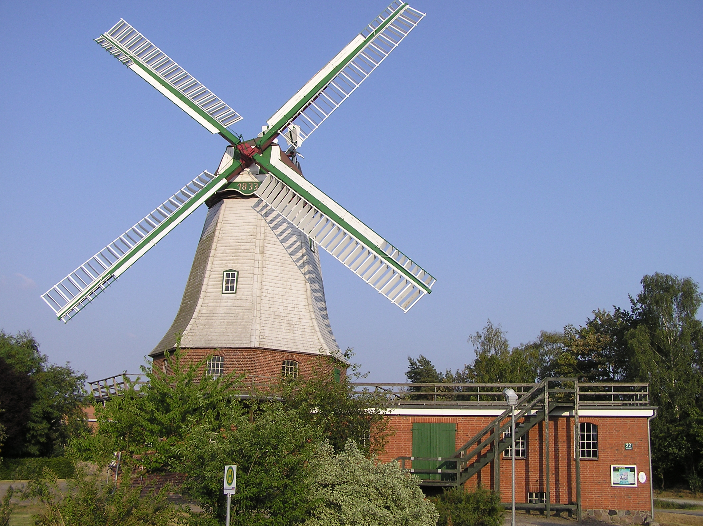 Windmill Artlenburg,NS,Germany